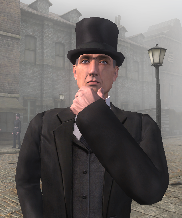 Capture d'écran du jeu Sherlock Holmes contre Jack l'Éventreur. Nous avons ici Sherlock Holmes, pensif, dans le brouillard londonien.